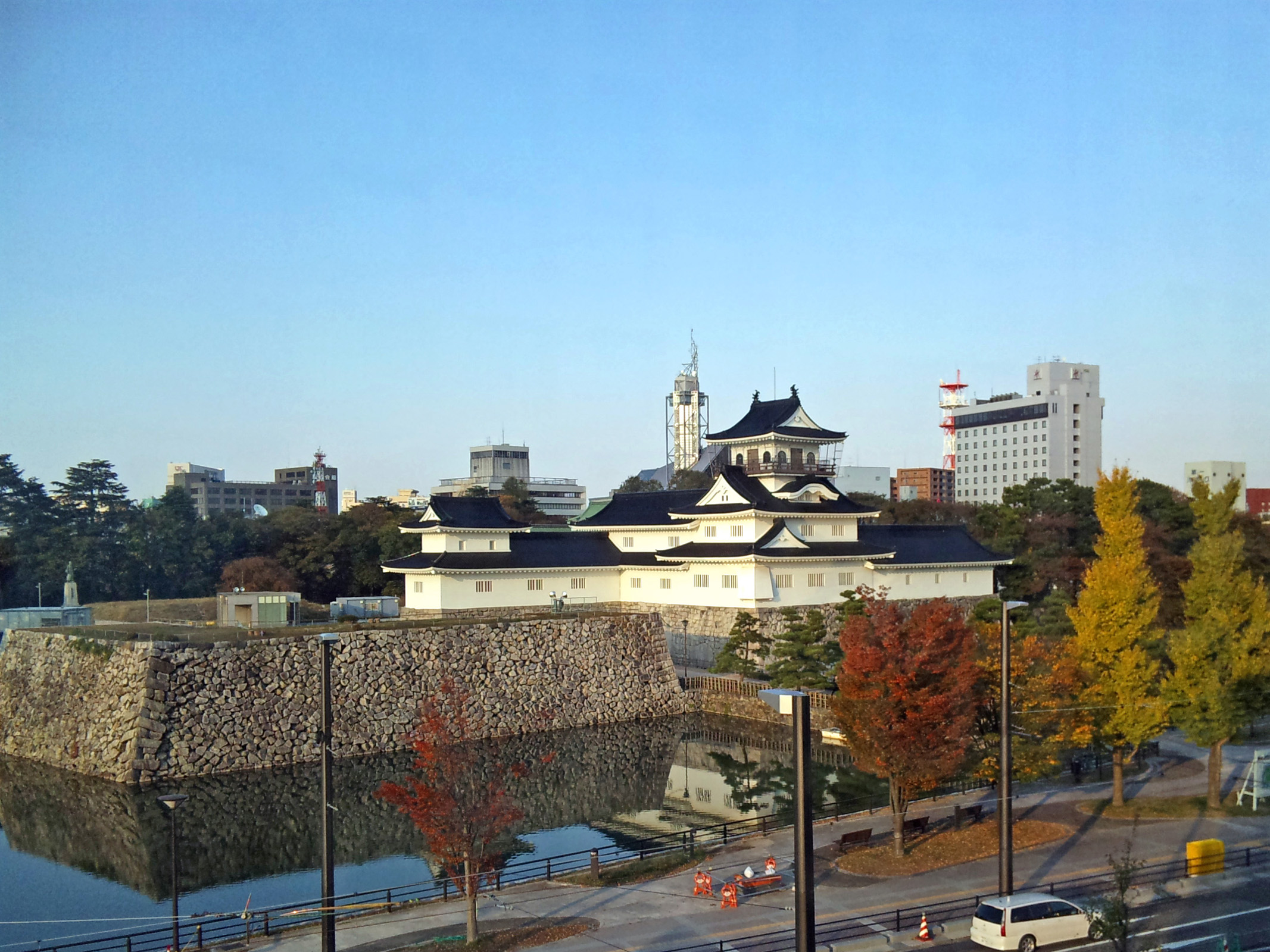 改修が済んだ富山城、周りは整備中